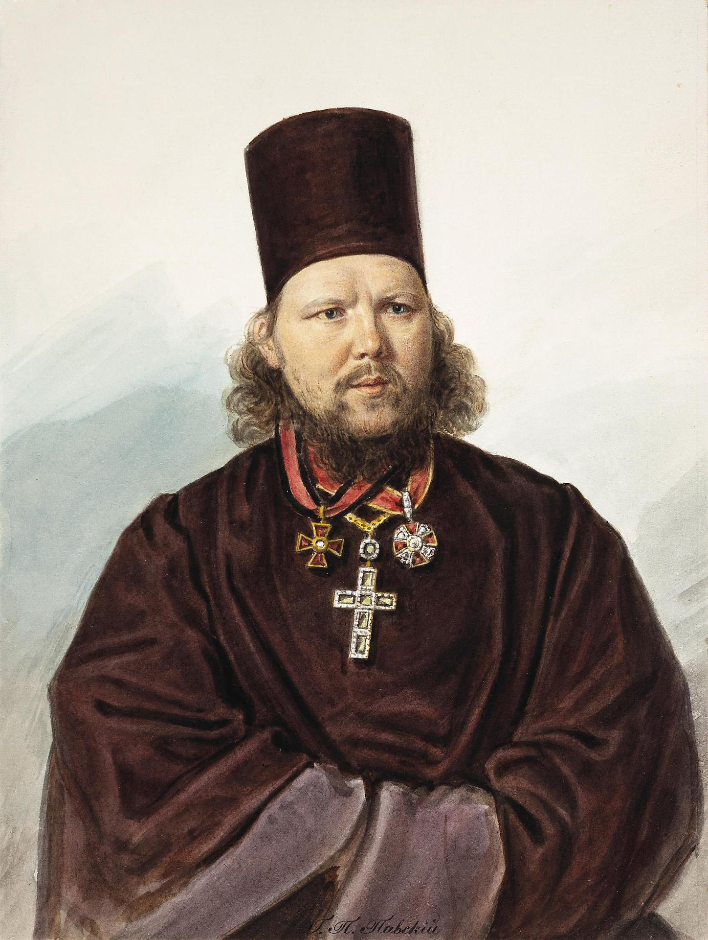 Серия "Портреты воспитателей будущего императора Александра II"